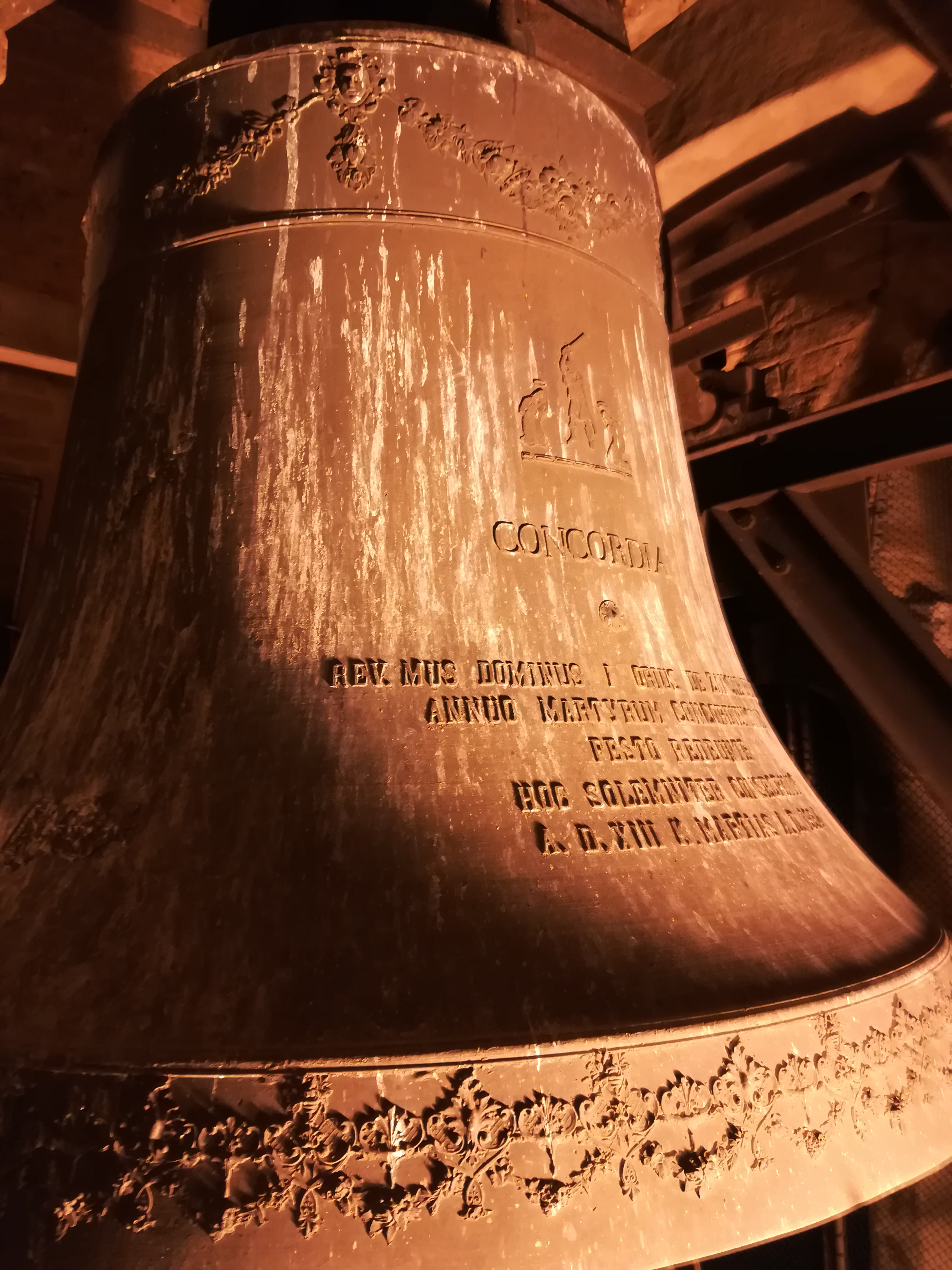 Si tratta della maggiore delle campane presenti sul campanile della Cattedrale di Santo Stefano Protomartire di Concordia Sagittaria. Venne fusa nel 1954.